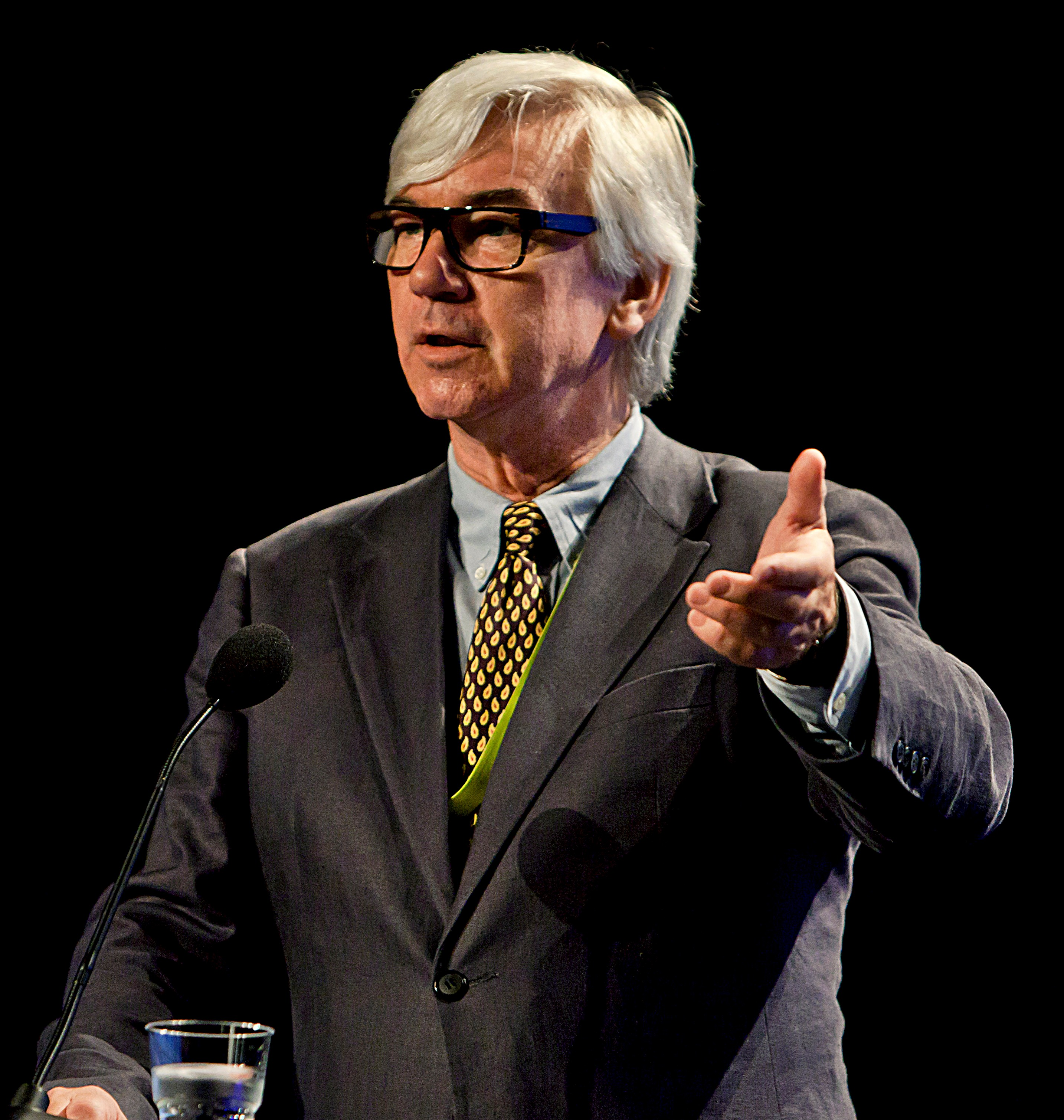 Ole Torp (født 1951 i Bergen) er en norsk journalist. Foto: Jarle H. Moe